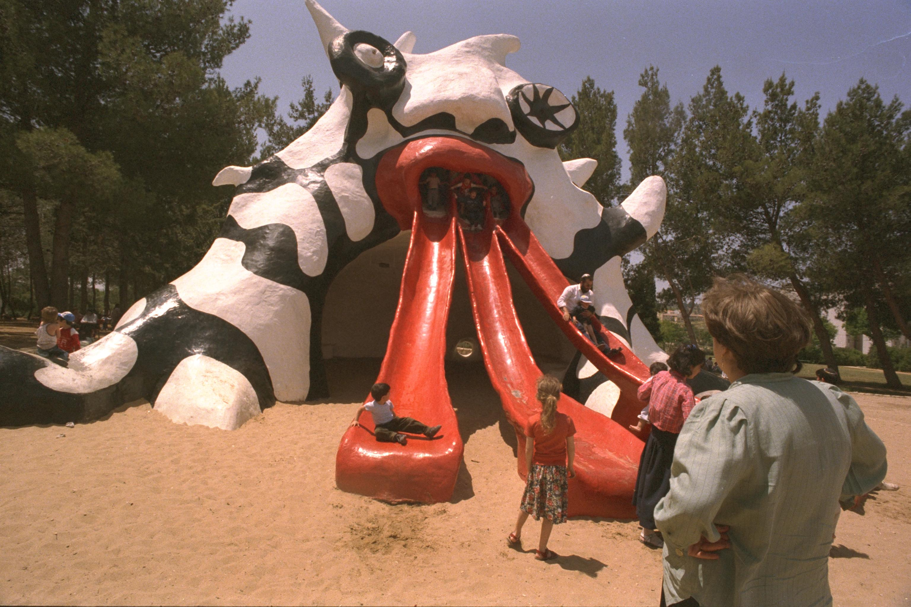 Children play on the giant monster slide in Jerusalem's Kiryat Yovel neighborhood. ילדים משחקים בגן המפלצת בקרית יובל בירושלים Photo: ALPERT NATHAN, 05/13/1990